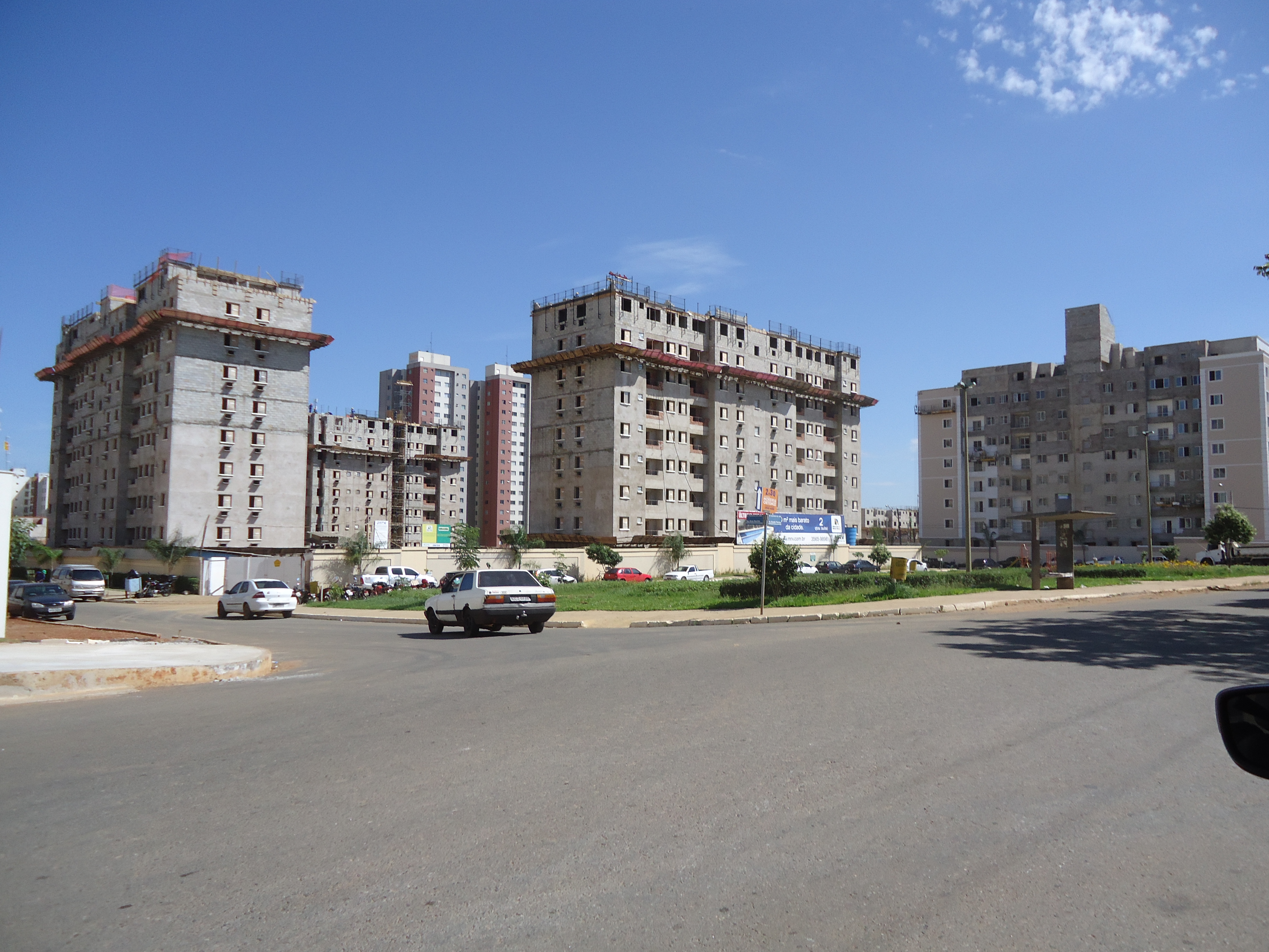 Prédios e Rua no Negrão de Lima